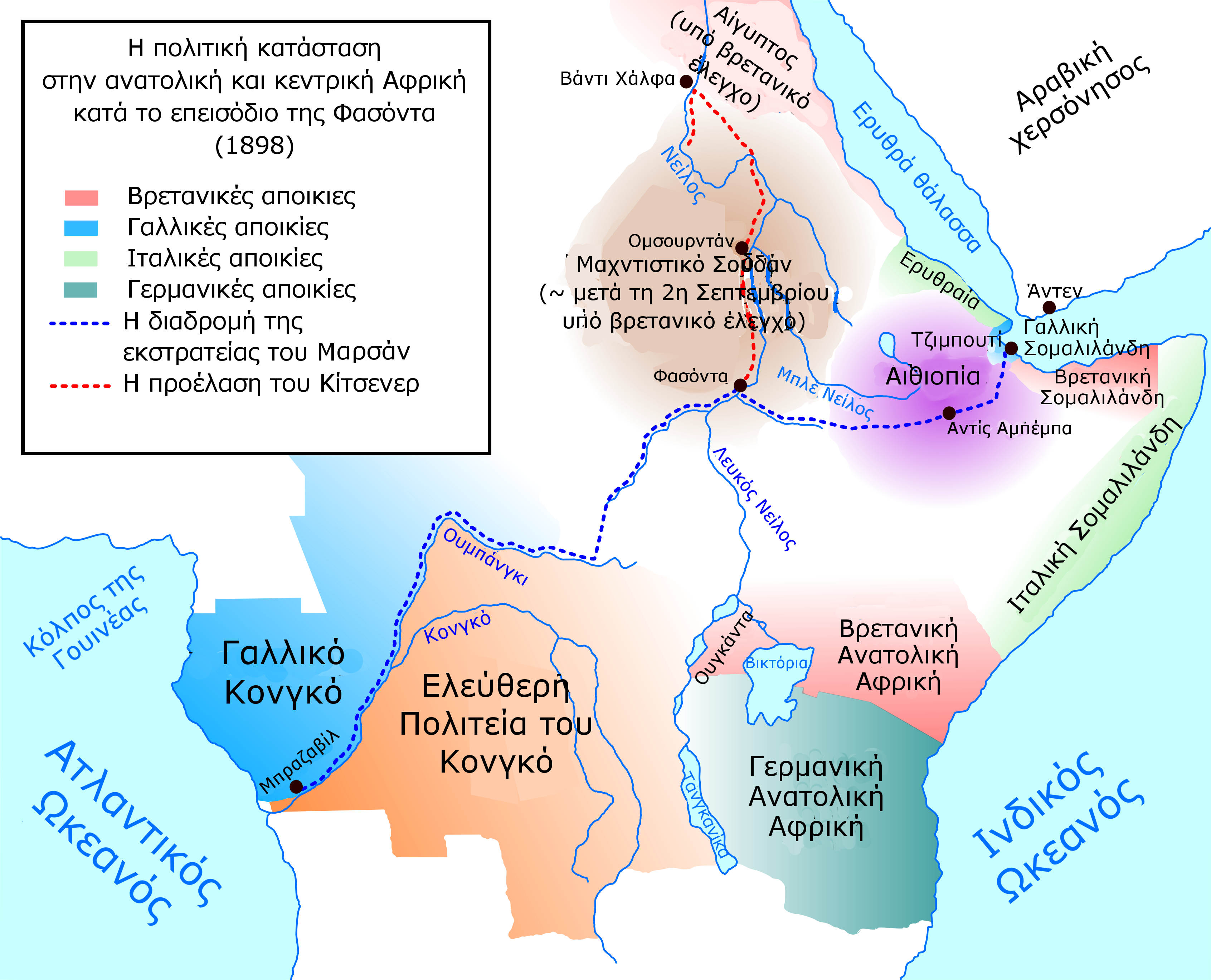 Η κεντρική και ανατολική Αφρική κατά το Επεισόδιο της Φασόντα (1898).